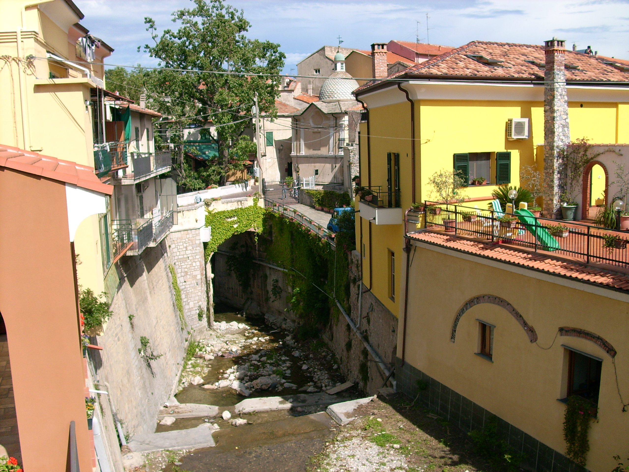 Toirano, Liguria, Italia